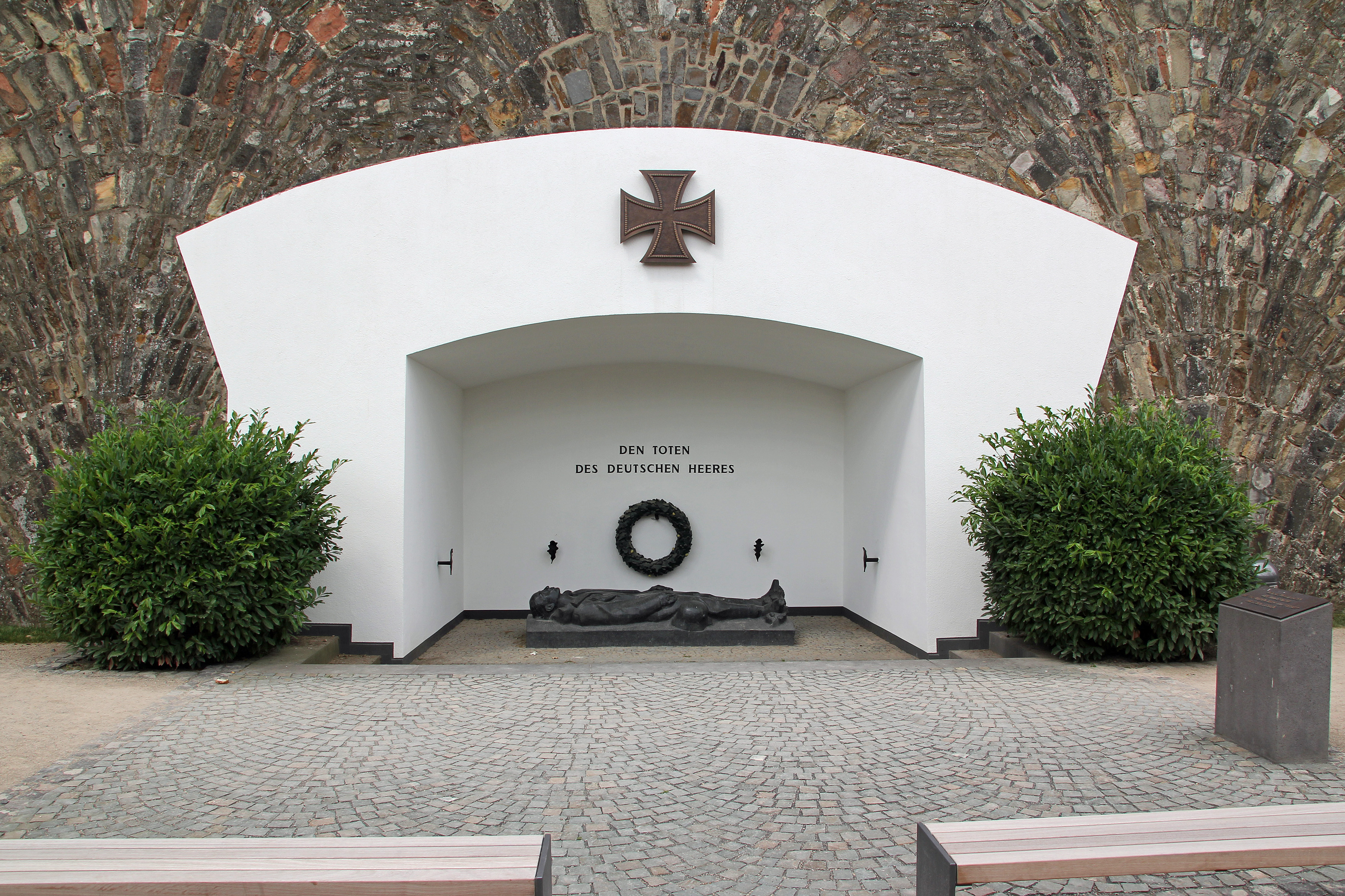 Koblenz im Buga-Jahr 2011 - Das Ehrenmal des Deutschen Heeres auf der Festung Ehrenbreitstein